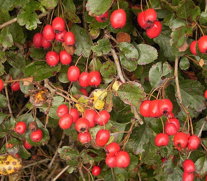 Crataegus laevigata